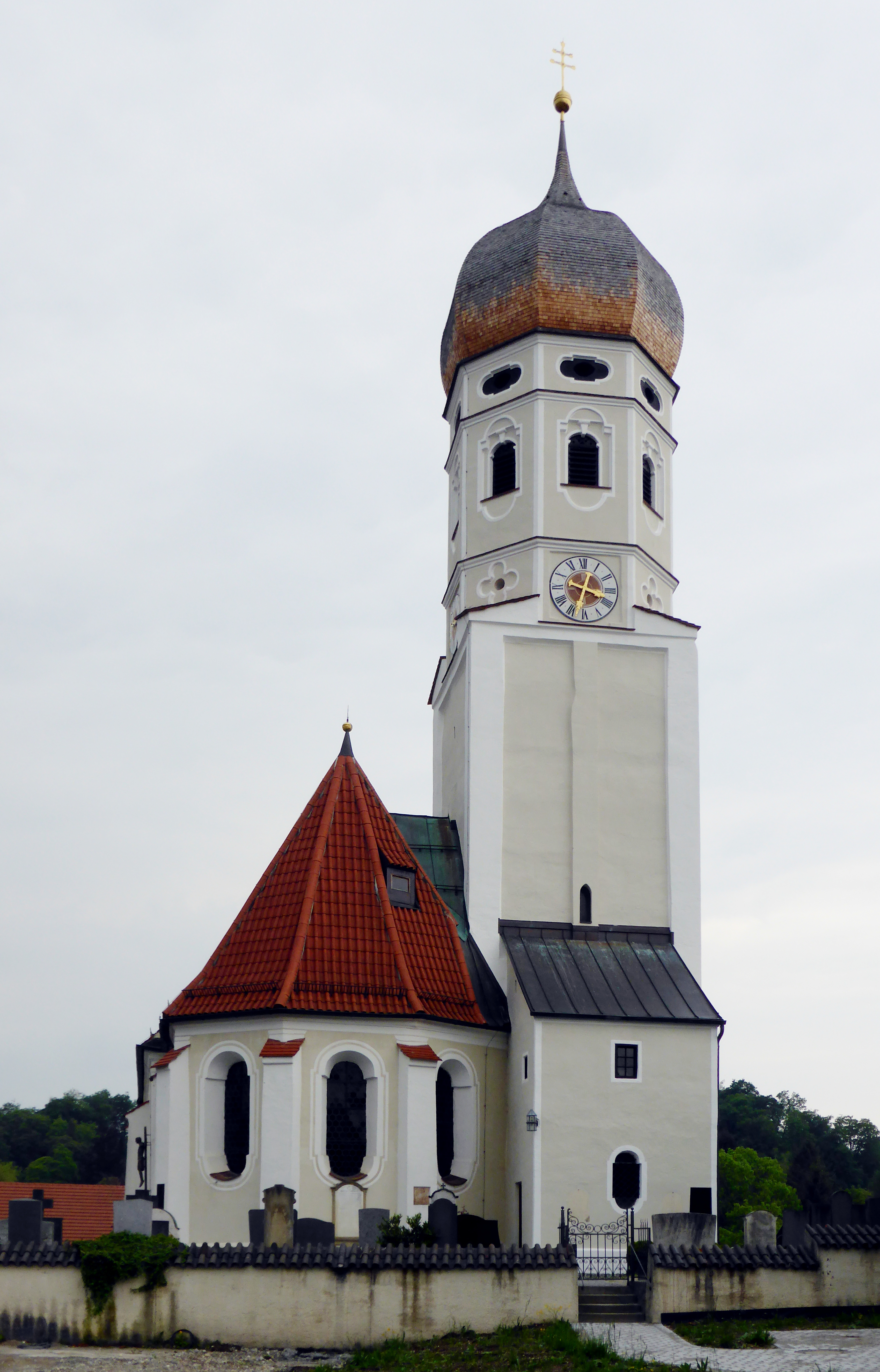 Kirche Sankt Vitus in Erling, von Osten.